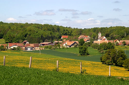 Fahy, Kanton Jura, Schweiz